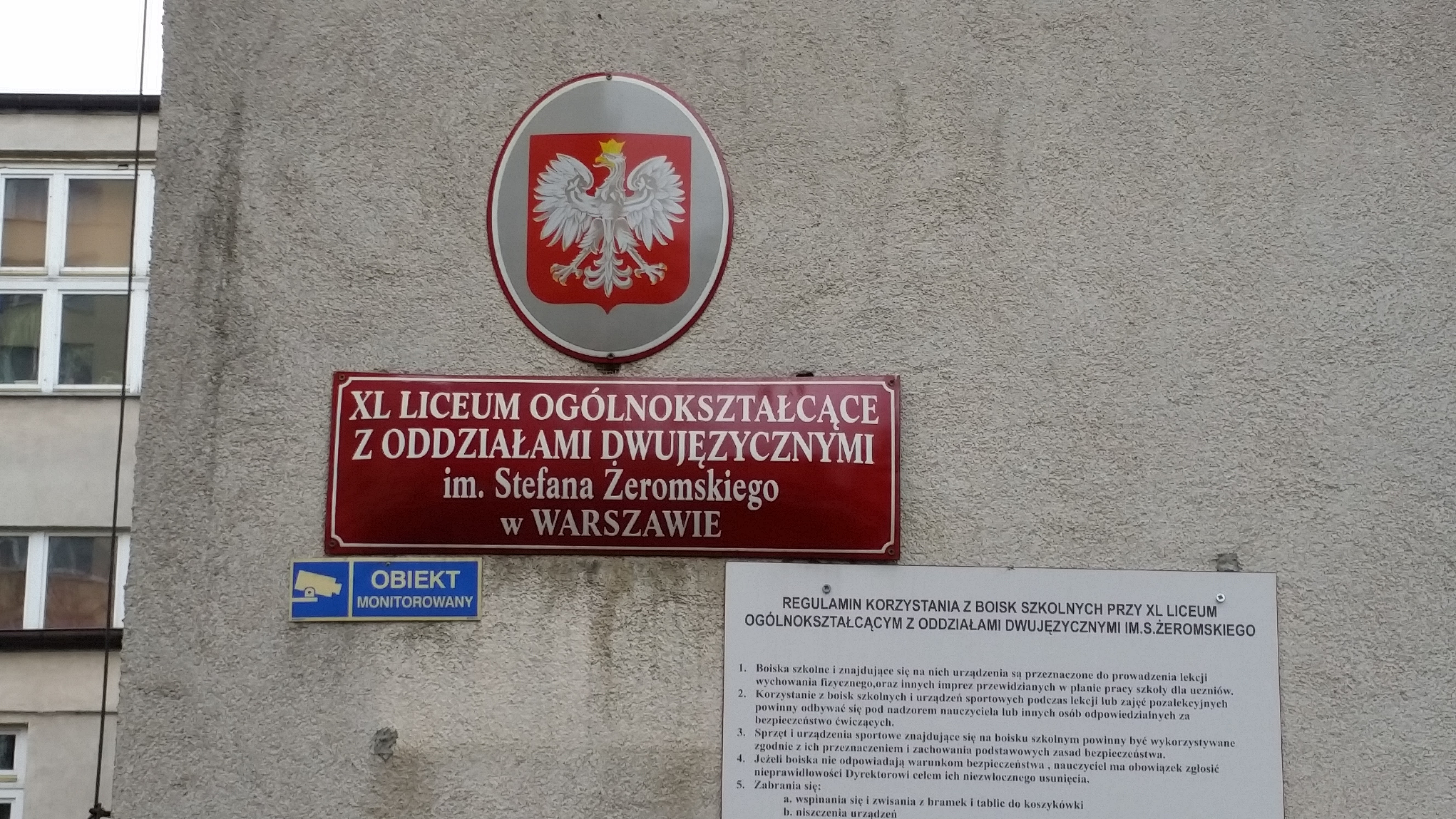 XL Liceum Ogólnokształcące z Oddziałami Dwujęzycznymi im. Stefana Żeromskiego w Warszawie